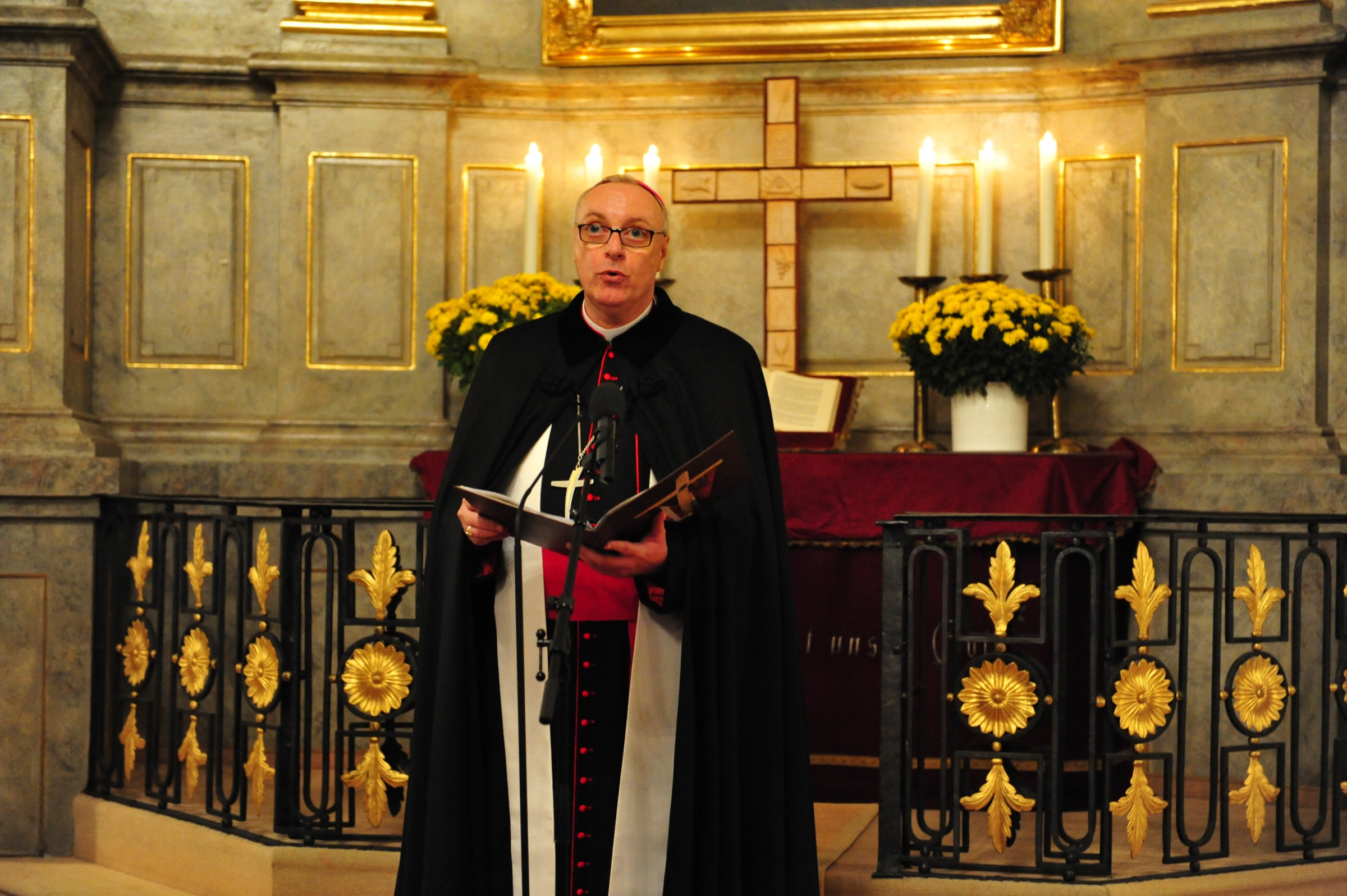 Der katholische Bischof Ägidius J. Zsifkovics im Rahmen des Ökumenischen Gottesdiensts in der evangelischen Pfarrkirche in Rust.